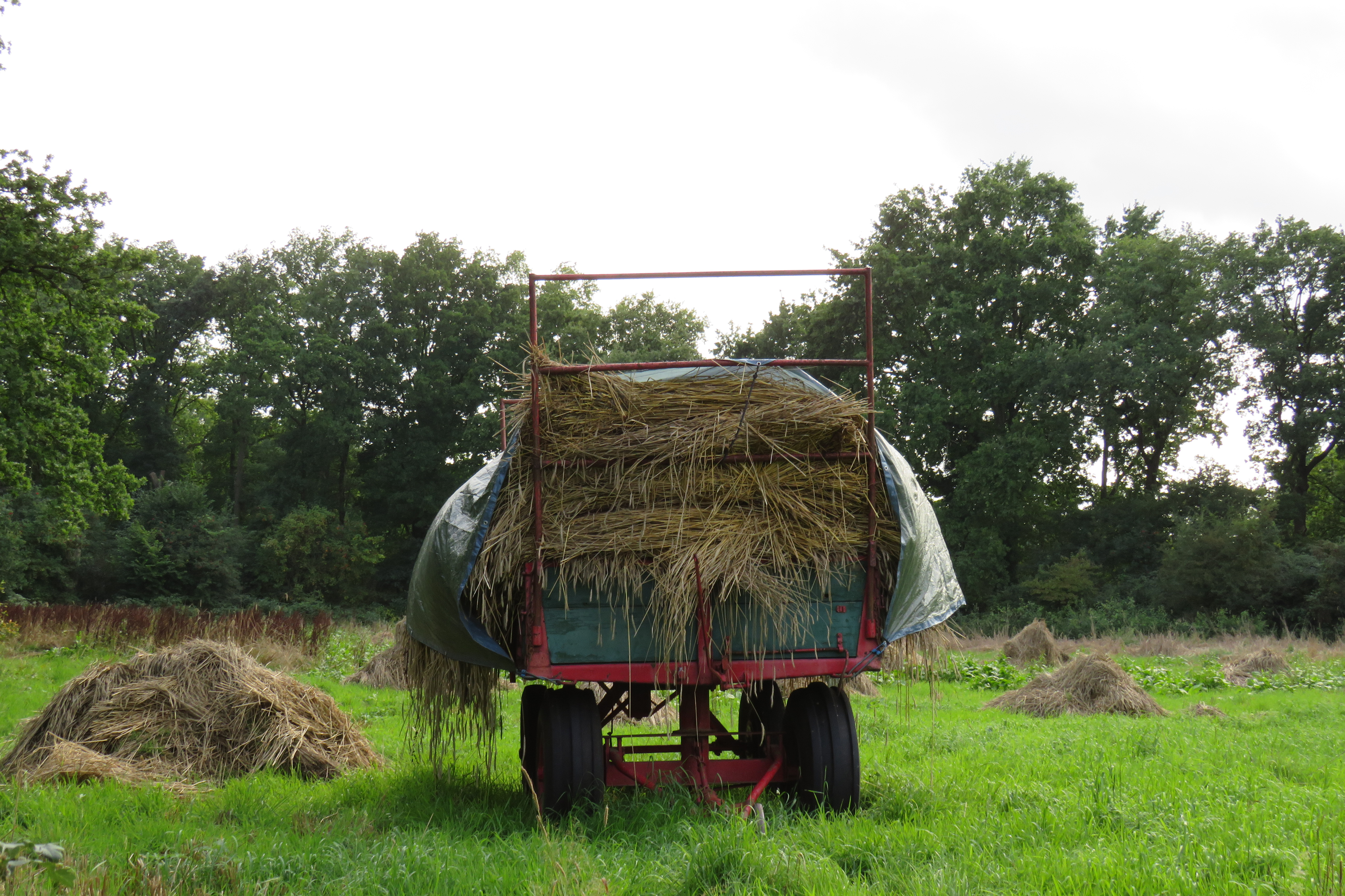 Hooiwagen in Eindhoven - augustus 2017